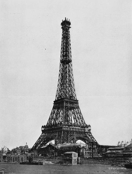 Tour Eiffel : Montage du campanile (15 mars 1889)